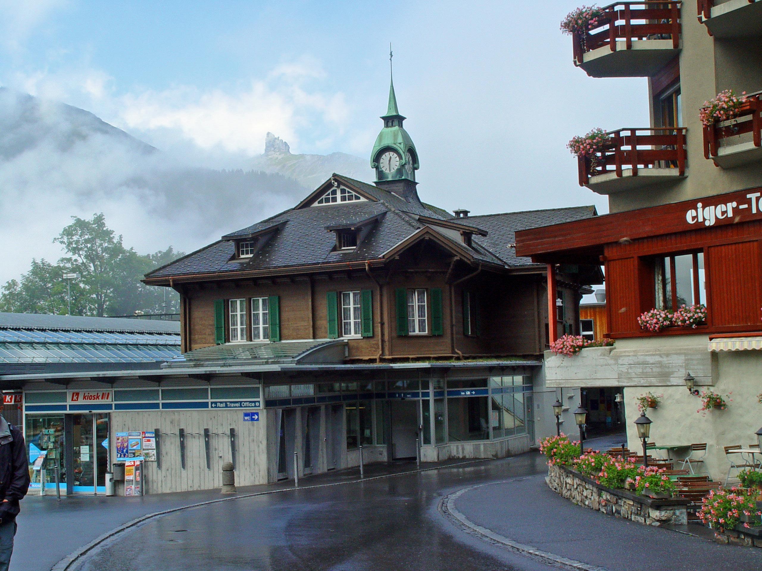 Bahnhof in Wengen, Gemeinde Lauterbrunnen, Amtsbezirk Interlaken, Kanton Bern, Schweiz.